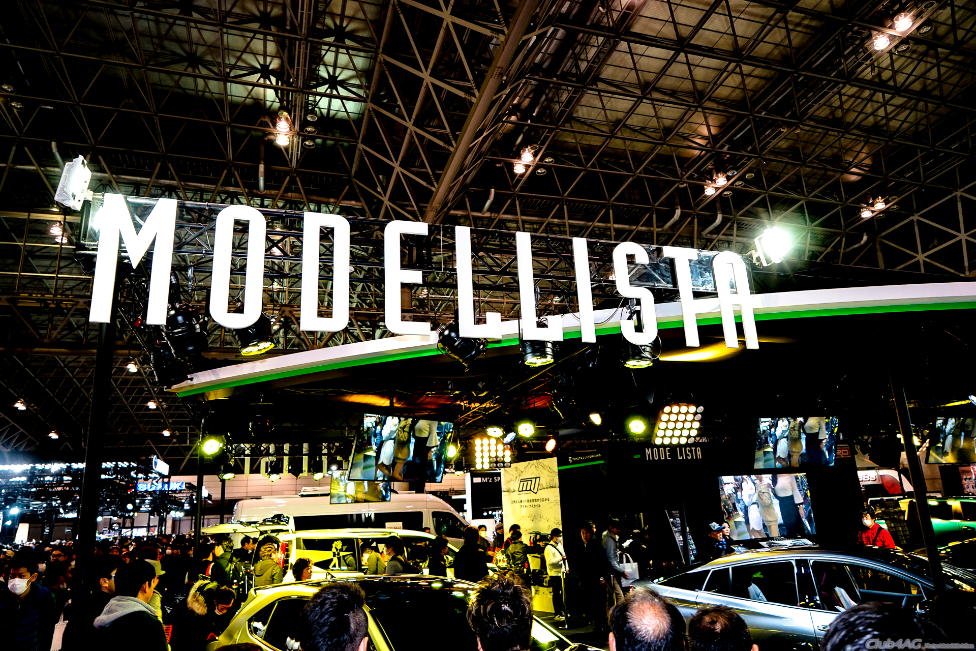 Tokyo Auto Salon 2019